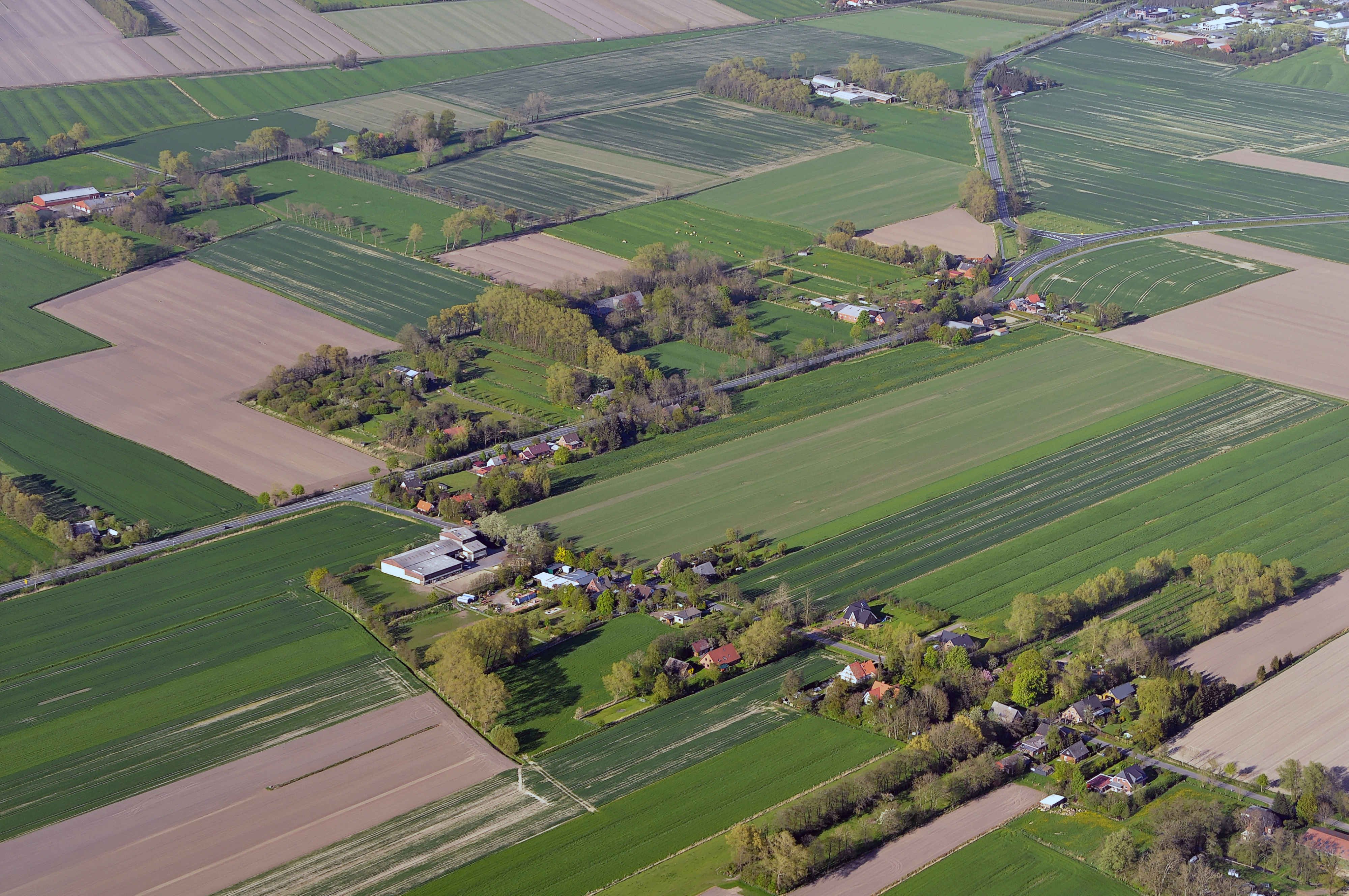 Luftbilder von der Nordseeküste 2012-05